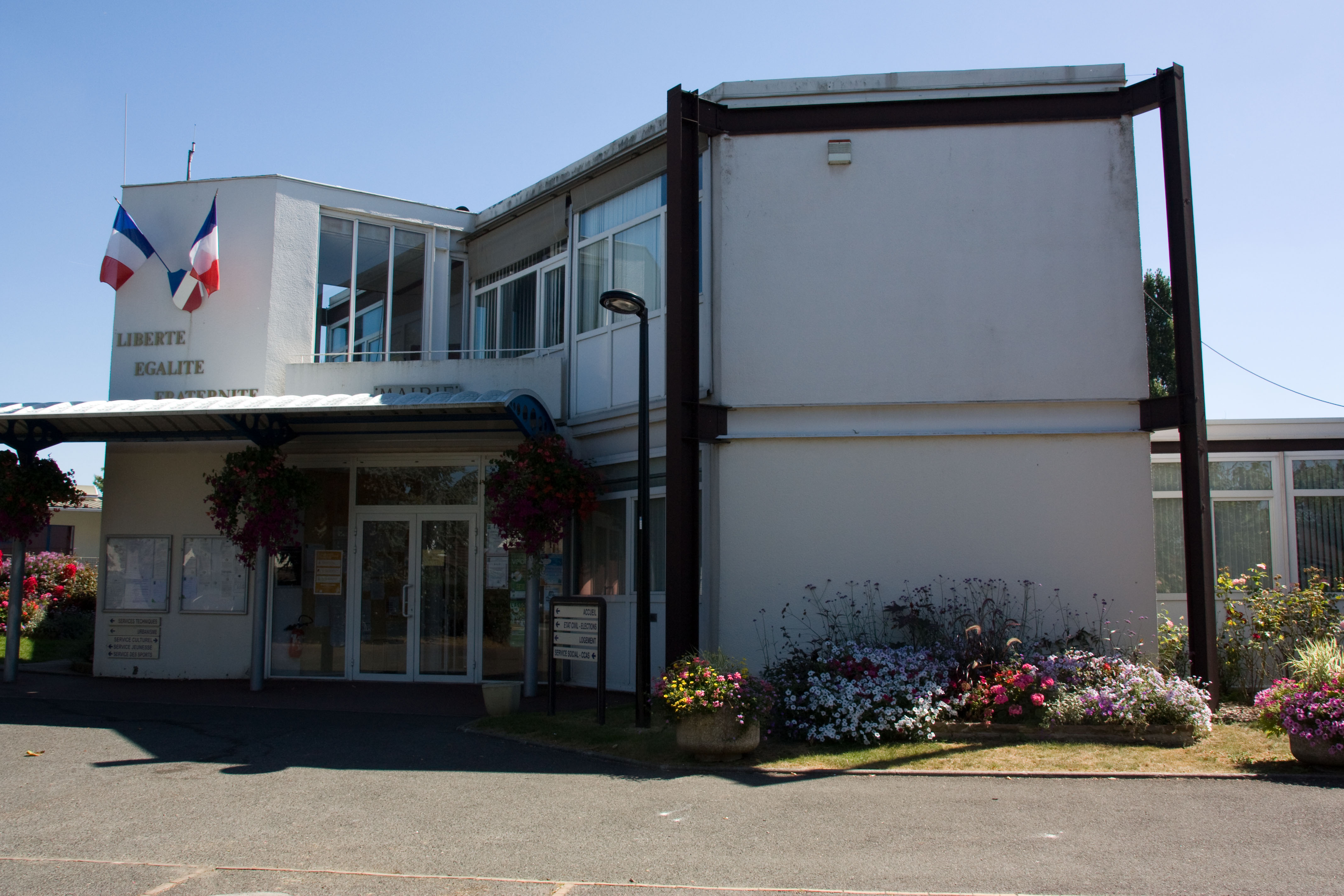 Mairie de Saint-Pierre-du-Perray, Saint-Pierre-du-Perray, Essonne, France